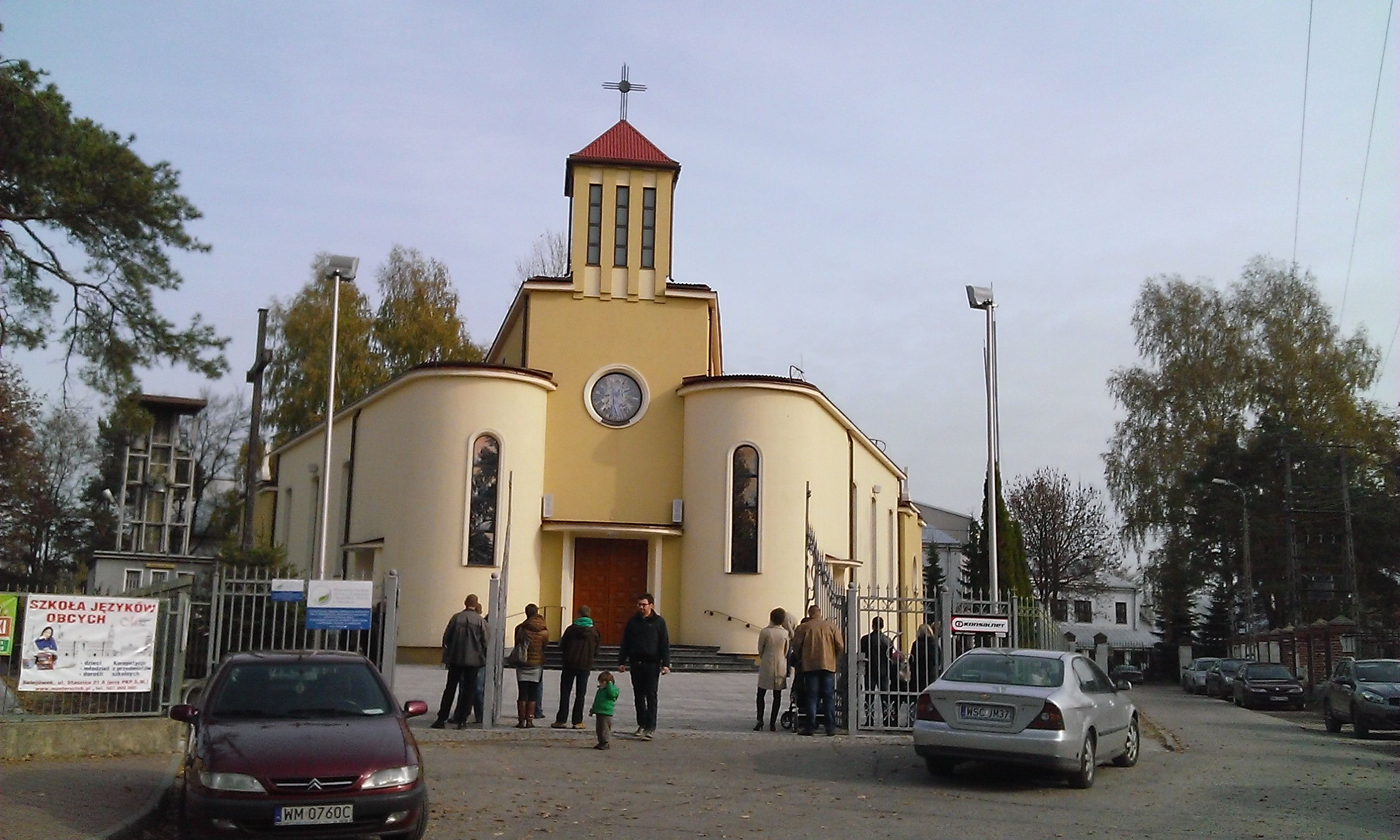 Sulejówek Miłosna - kościół Przemienienia Pańskiego